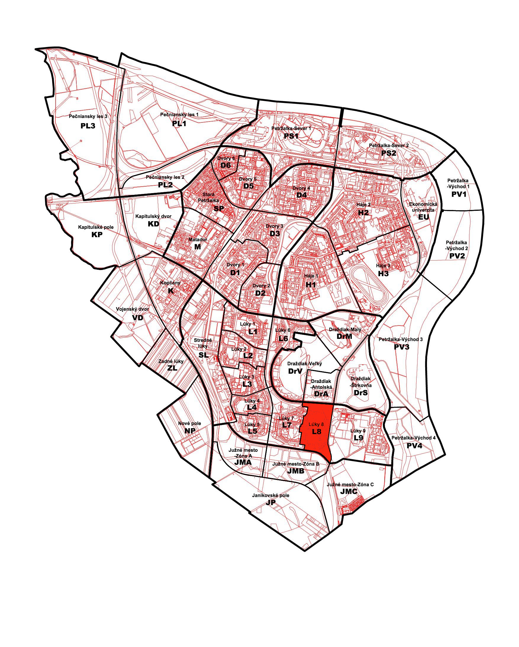 Poloha miestnej časti Petržalky